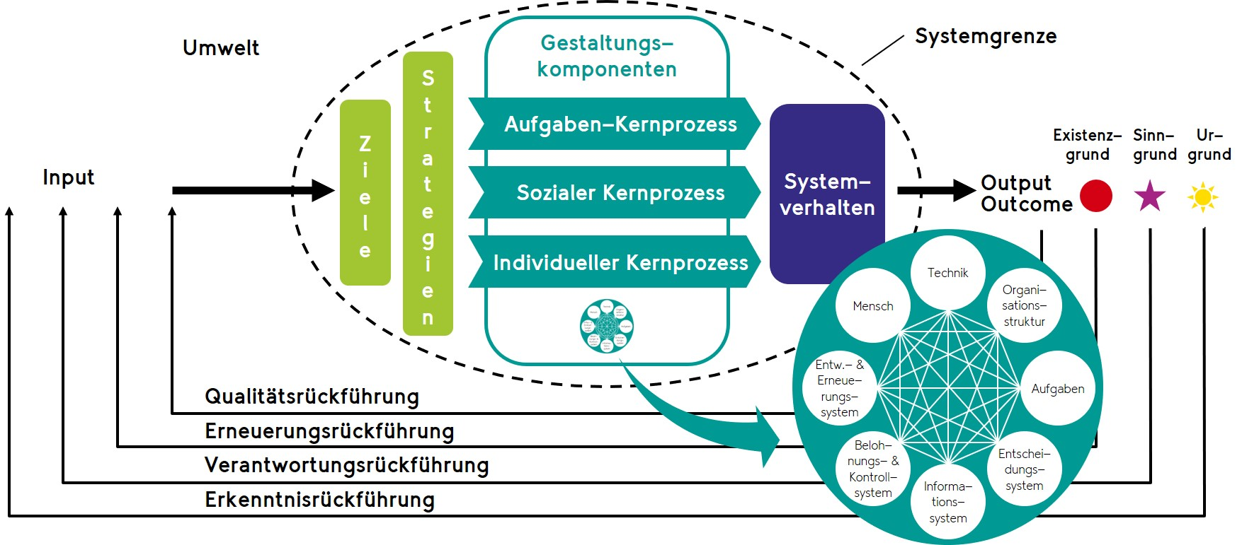 OSTO-Systemmodell Strukturvariante